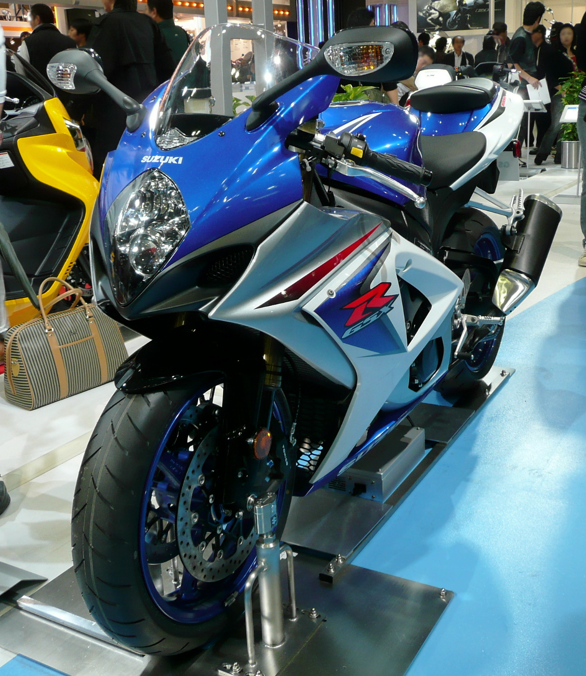 Suzuki GSX-R1000 (2007 Tokyo Motor Show)